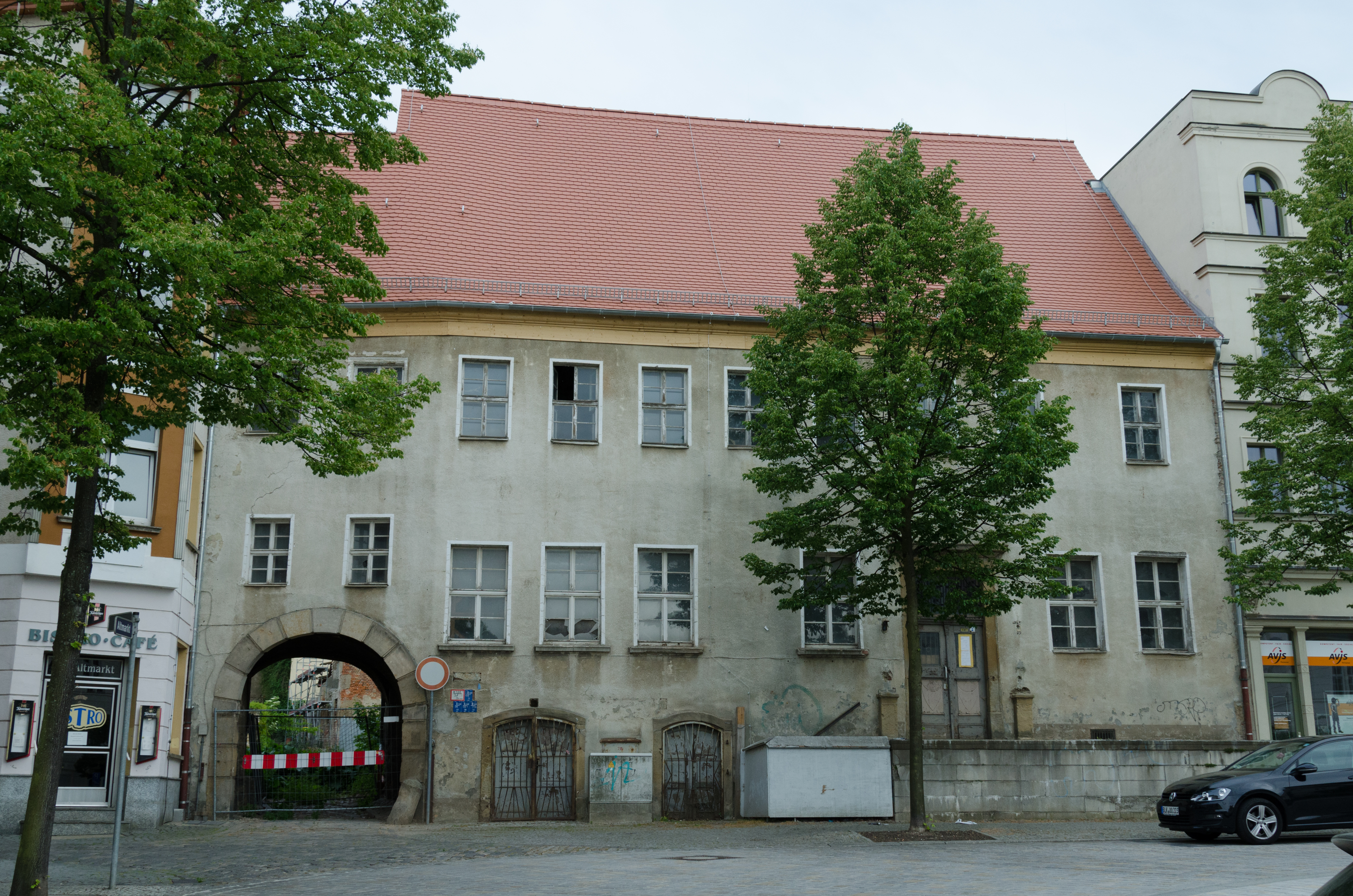 Zeitz, Altmarkt 8